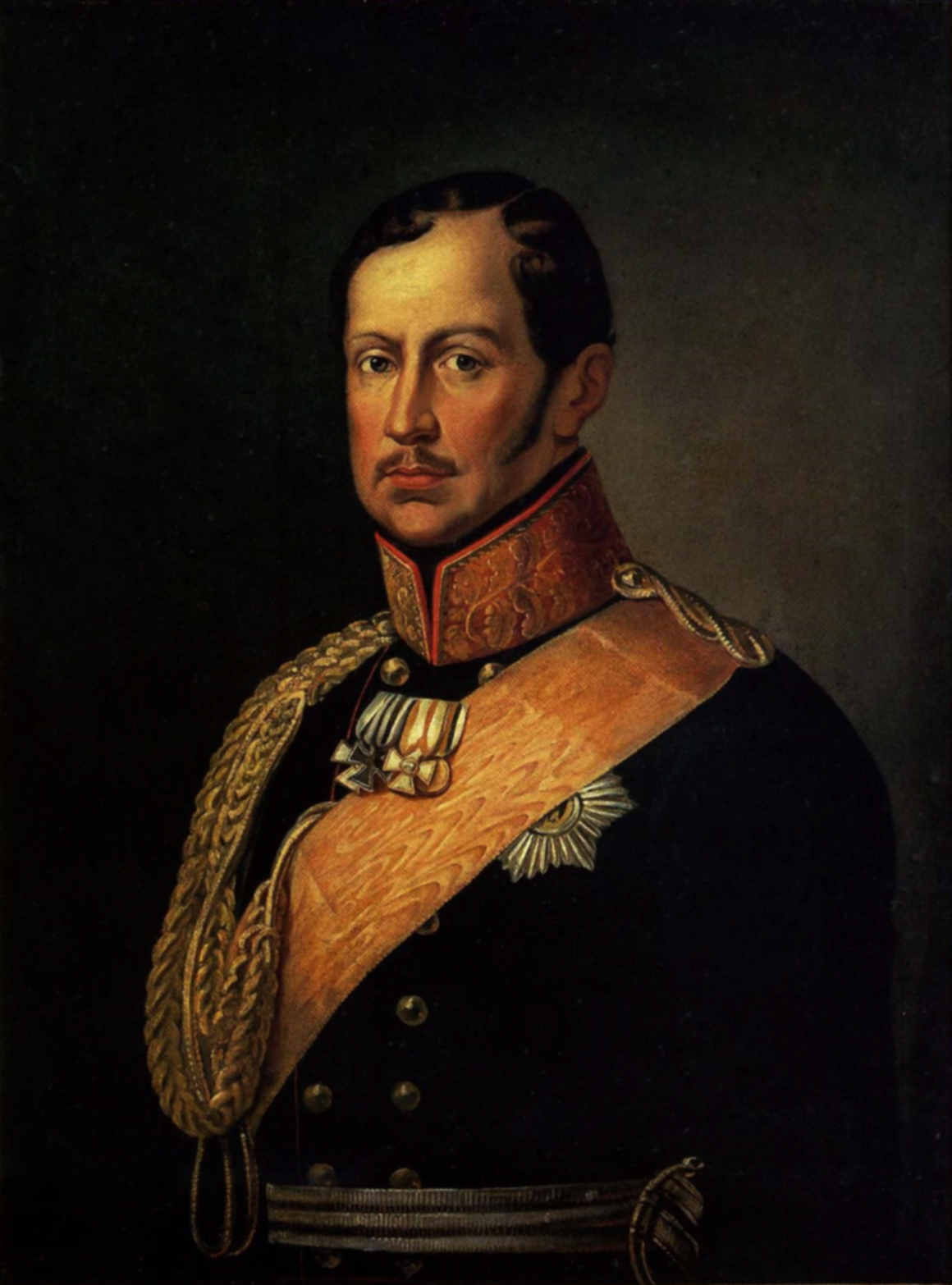 Friedrich Wilhelm III., König von Preußen.title QS:P1476,de:"Friedrich Wilhelm III., König von Preußen." label QS:Lde,"Friedrich Wilhelm III., König von Preußen."